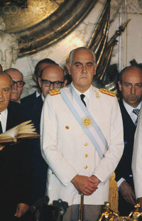 Es una foto a color del presidente de facto Alejandro Lanusse, vestido de blanco, cuando recién asumió la presidencia.